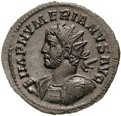 Antoninianus geslagen in 283/4 in Lugdunum met het portret van keizer Numerianus. Het opschrift luidt: IMP NVMERIANVS AVG (voluit: Imperator Numerianus Augustus).